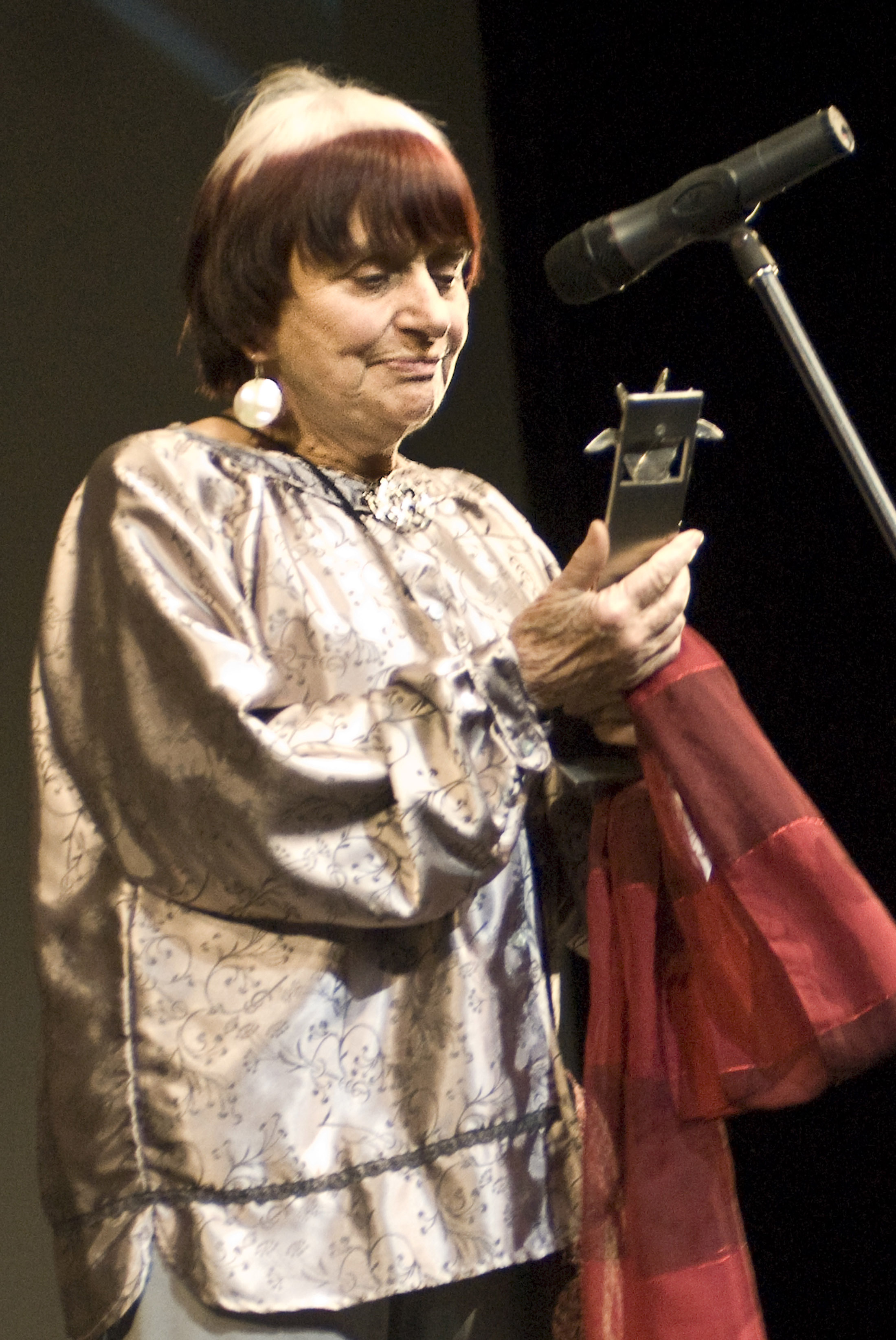 Mayahuel de plata a Agnés Vardá, en el marco de las actividades del Festival Internacional de Cine de Guadalajara en su edición 25. 18 de Marzo, 2010. Guadalajara, México. © Cortesía FICG25 / Michel Amado Carpio.